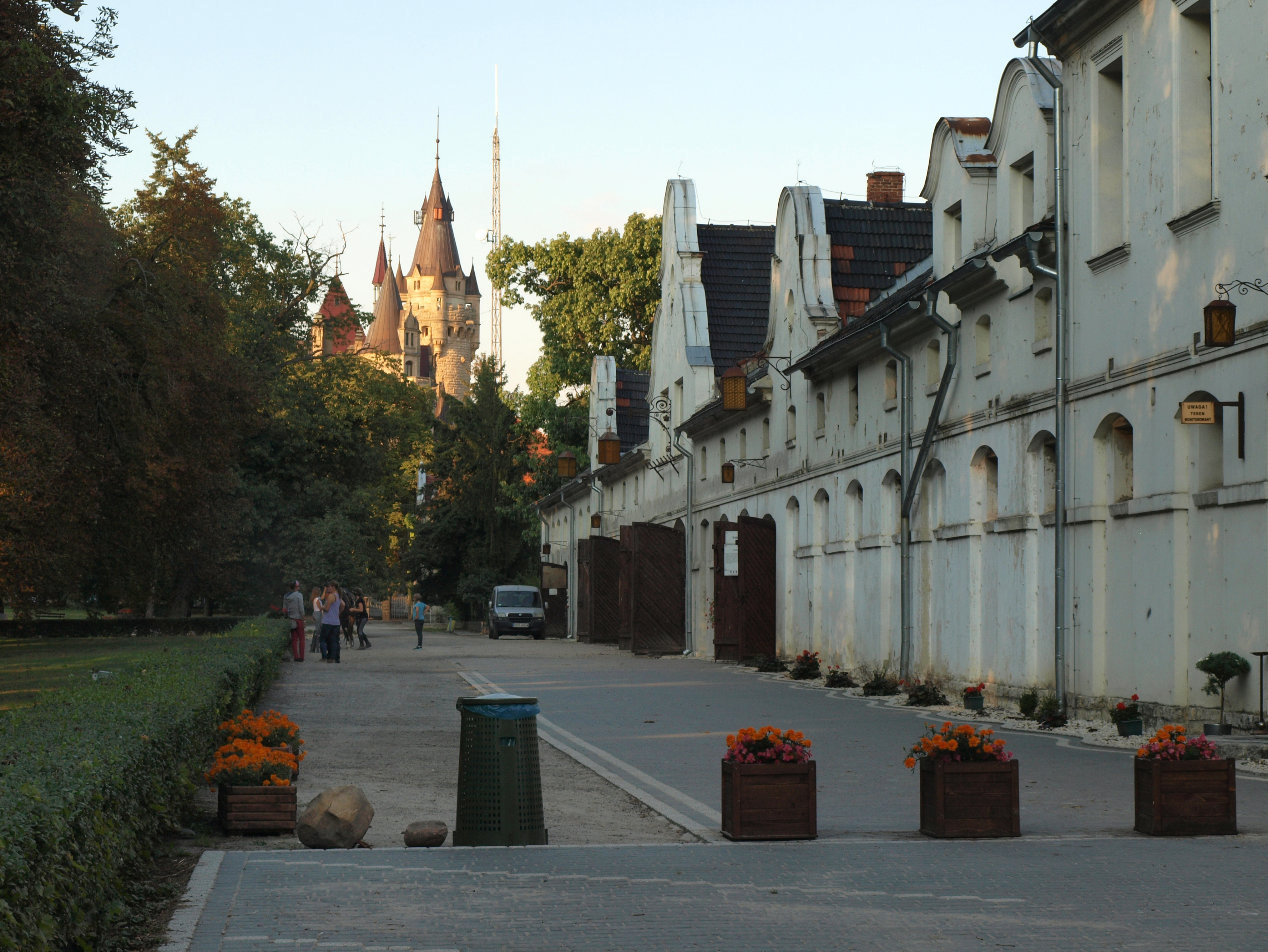 Moszna - stajnie, XIX/XX